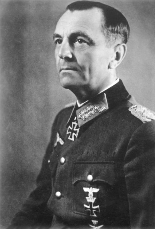 ADN-ZB/Archiv General der Panzertruppen Friedrich Paulus, Oberbefehlshaber der faschistischen deutschen 6. Armee, die Ende Januar 1943 bei Stalingrad vernichtet wurde. Aufgenommen im Juni 1942 in Charkow Information added by Wikimedia users.Паулюс в Харькове, июнь 1942. Жил на ул. Авиационной, 8.